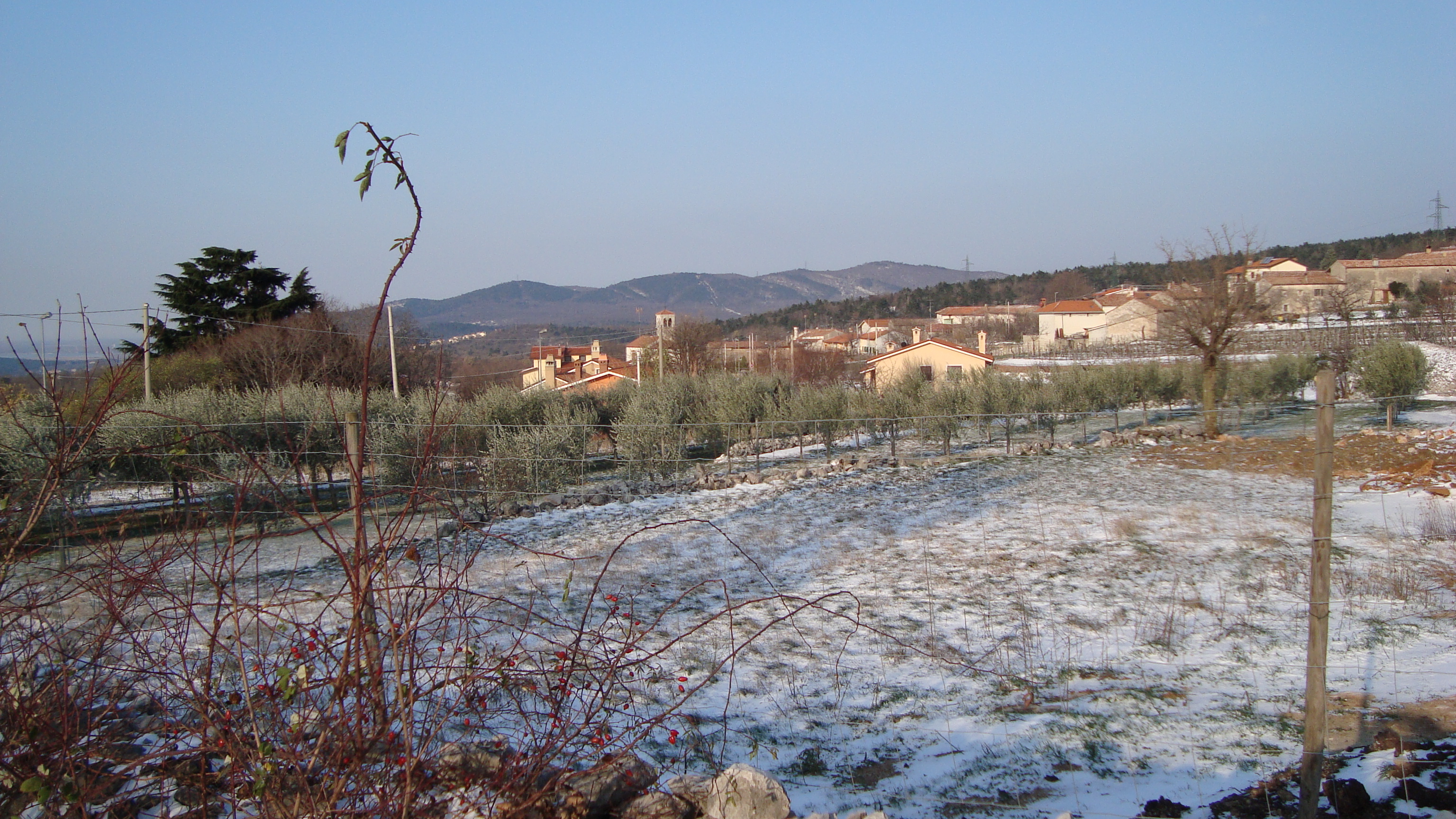 Vista invernale di Slivia